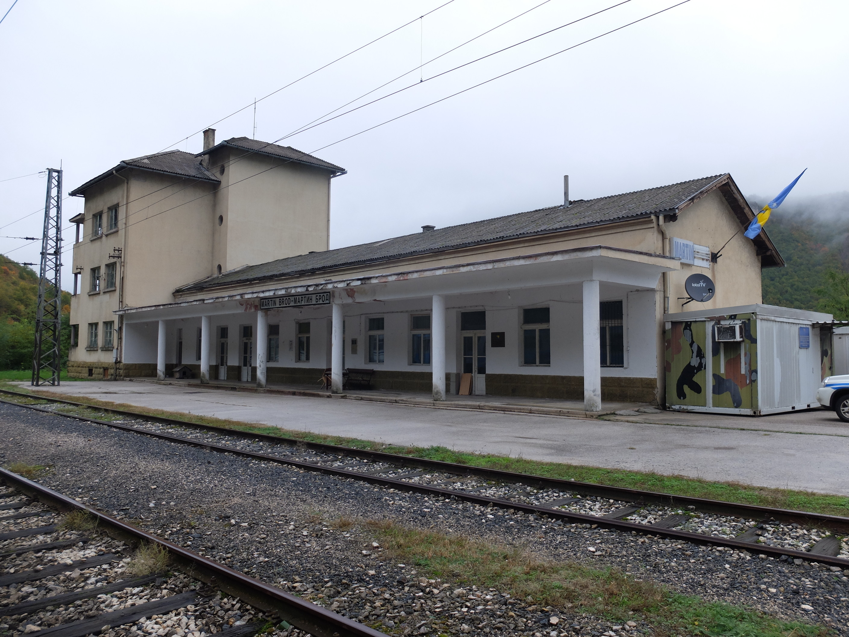 Bahnhof Martin Brod an der Una-Bahn